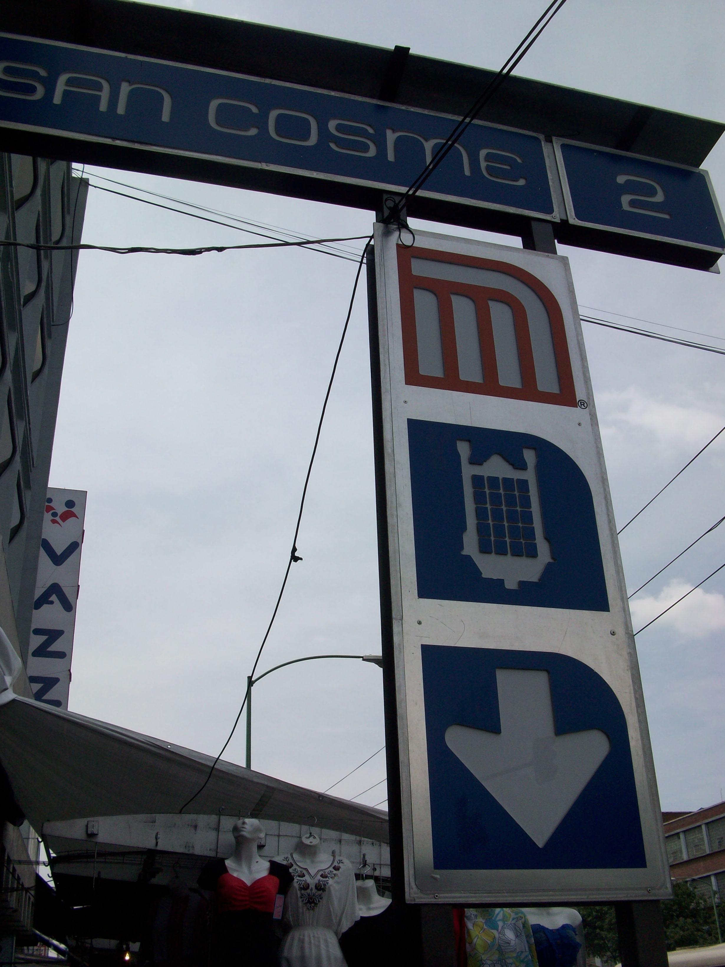 Estela de la estación San Cosme